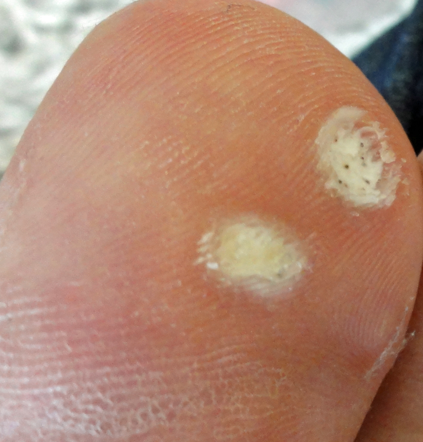 治療中の尋常性疣贅（ウィルス性のイボ）